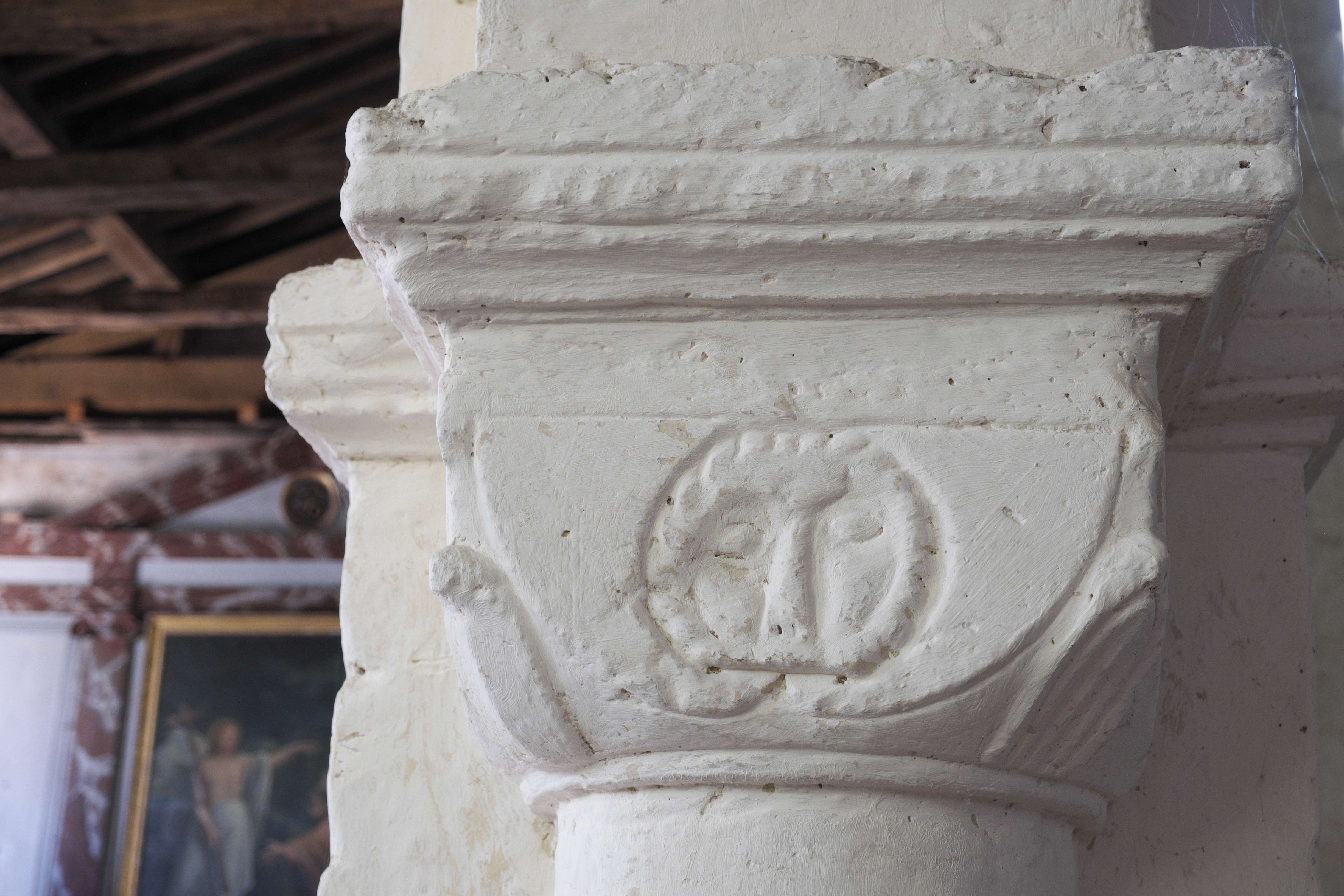 Katholische Kirche Saint-Symphorien in Ponthion im Département Marne in der Region Grand Est/Frankreich, Kapitell